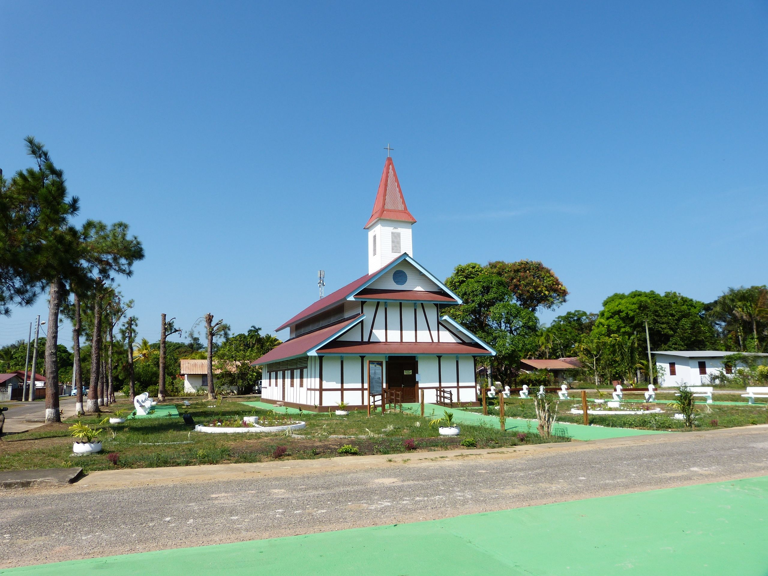 Eglise paroissiale Saint-Louis de Tonnégrande, sur la commune de Montsinéry-Tonnégrande (Guyane)